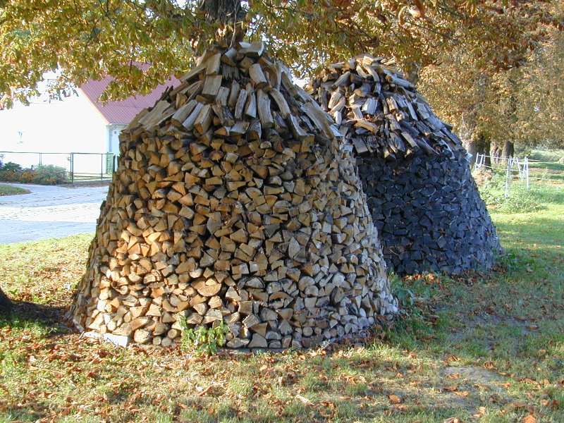 Holzmieten (Usedom)